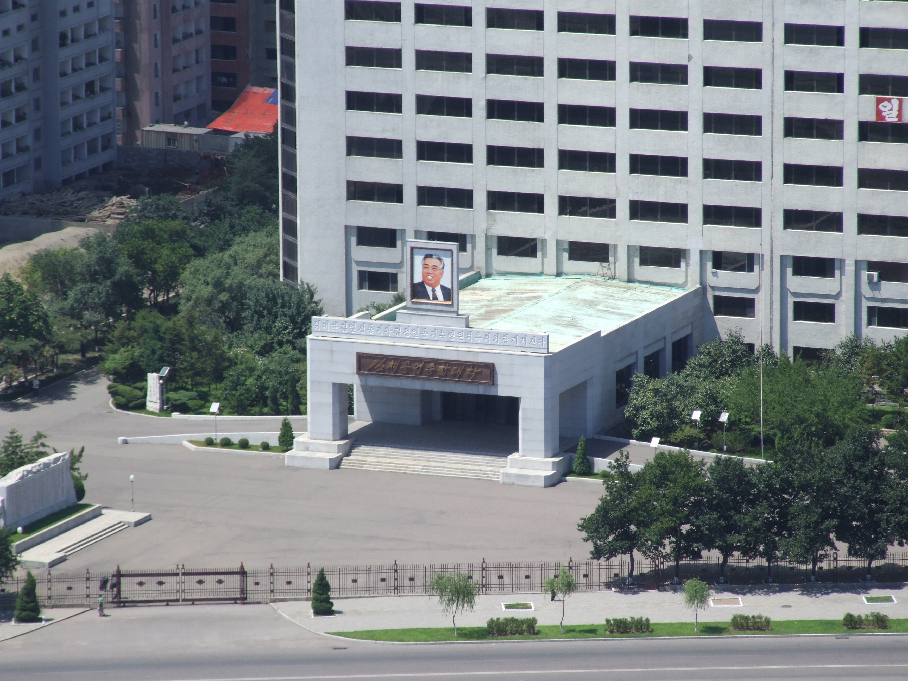 Blick vom Yanggakdo International Hotel